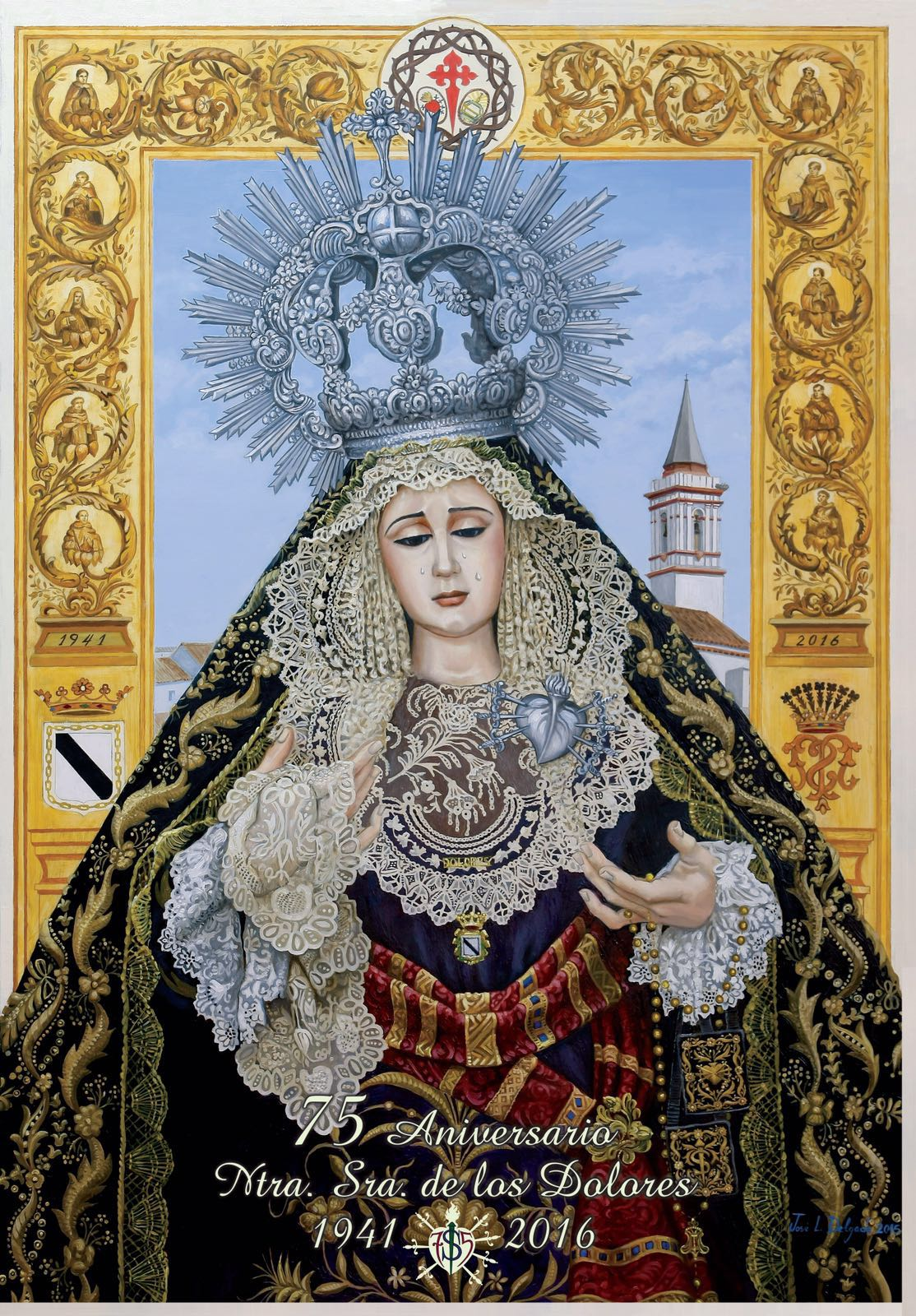 Cartel 75 Aniversario Dolores Gibraleón, obra de D. José Luís Delgado Blanco